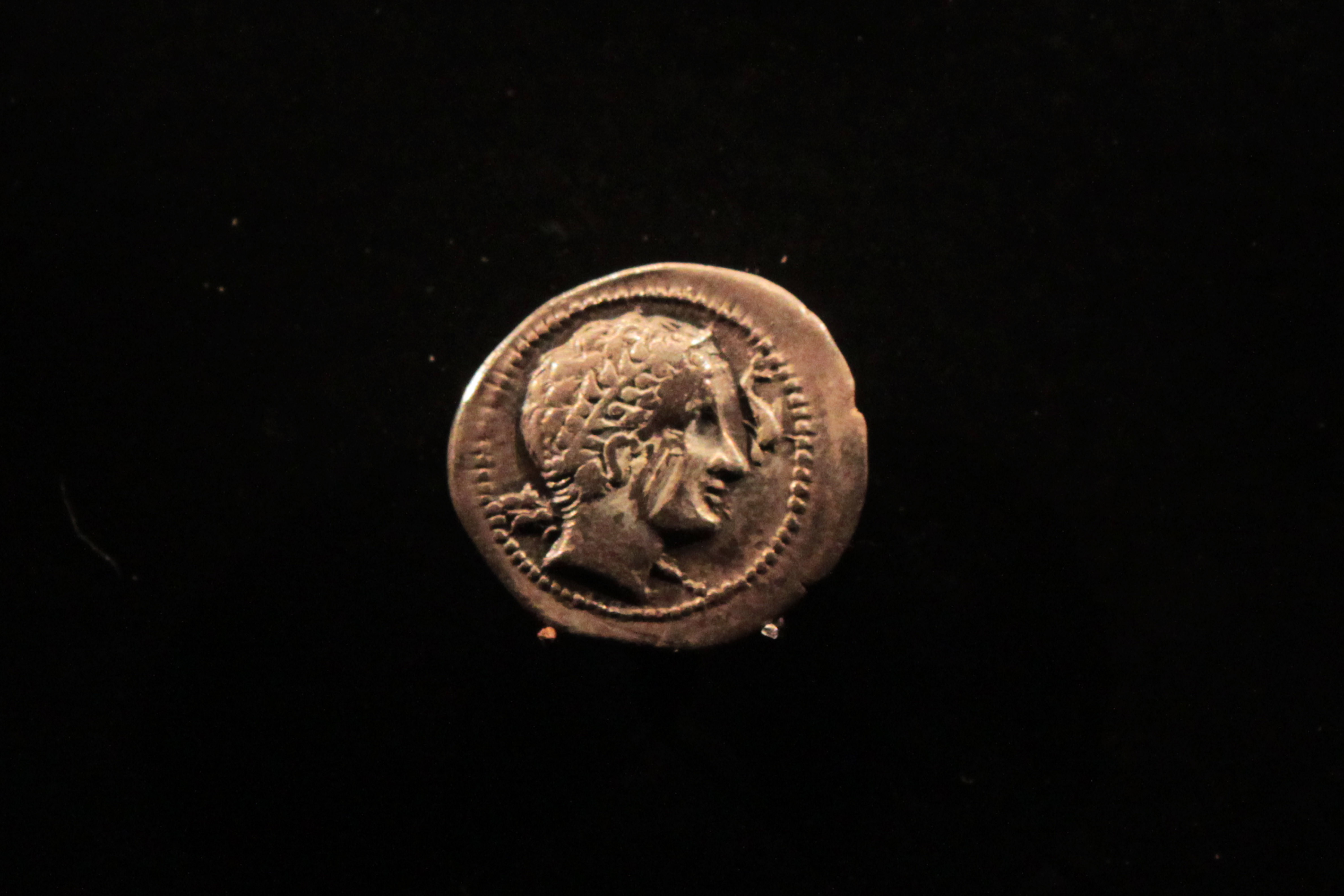 Dracma de Arse (Sagunto) del siglo II a.C. Fondos del Museo de Prehistoria de Valencia, Comunidad valenciana, España.